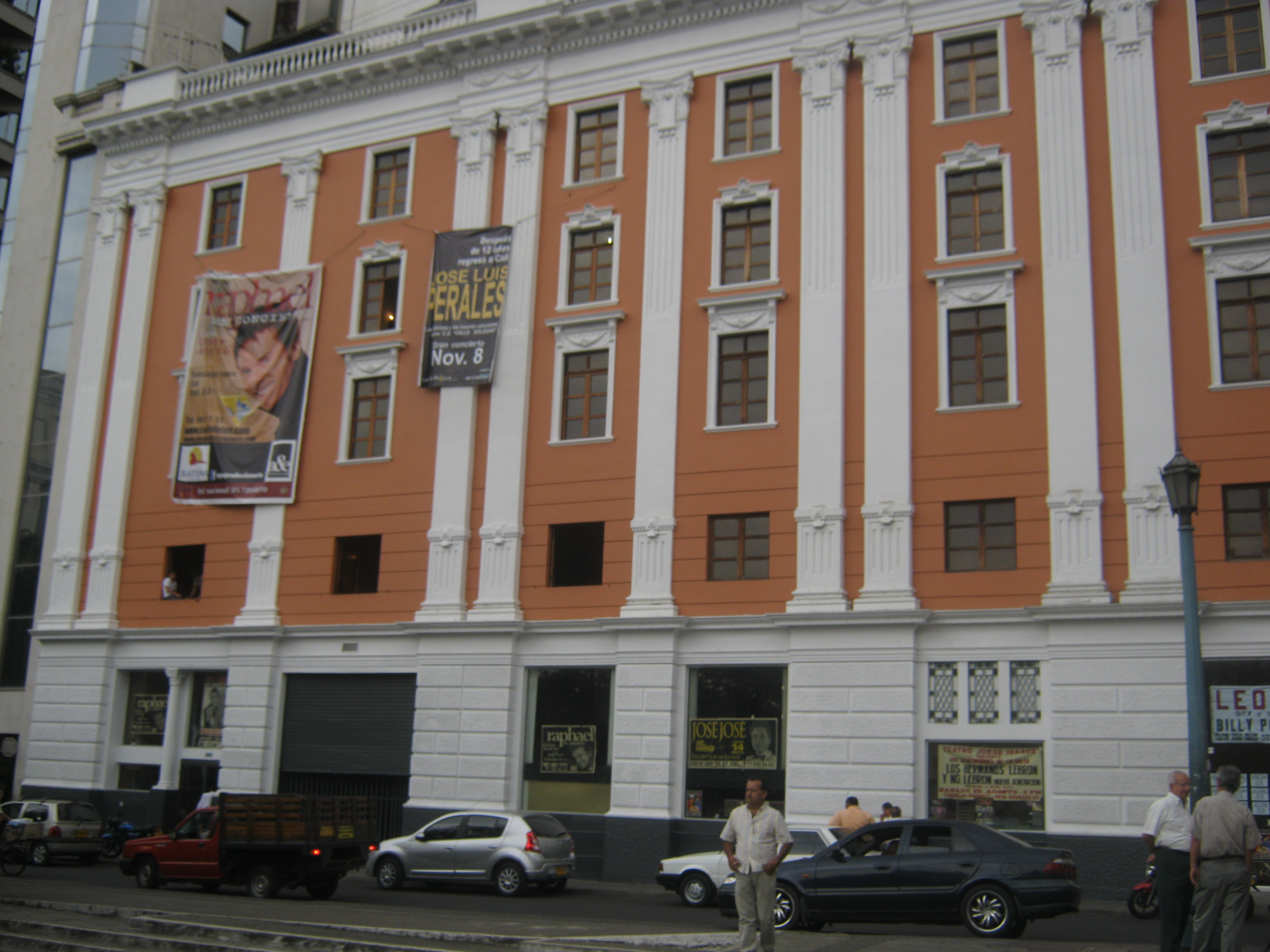 Teatro Jorge Isaacs en Cali